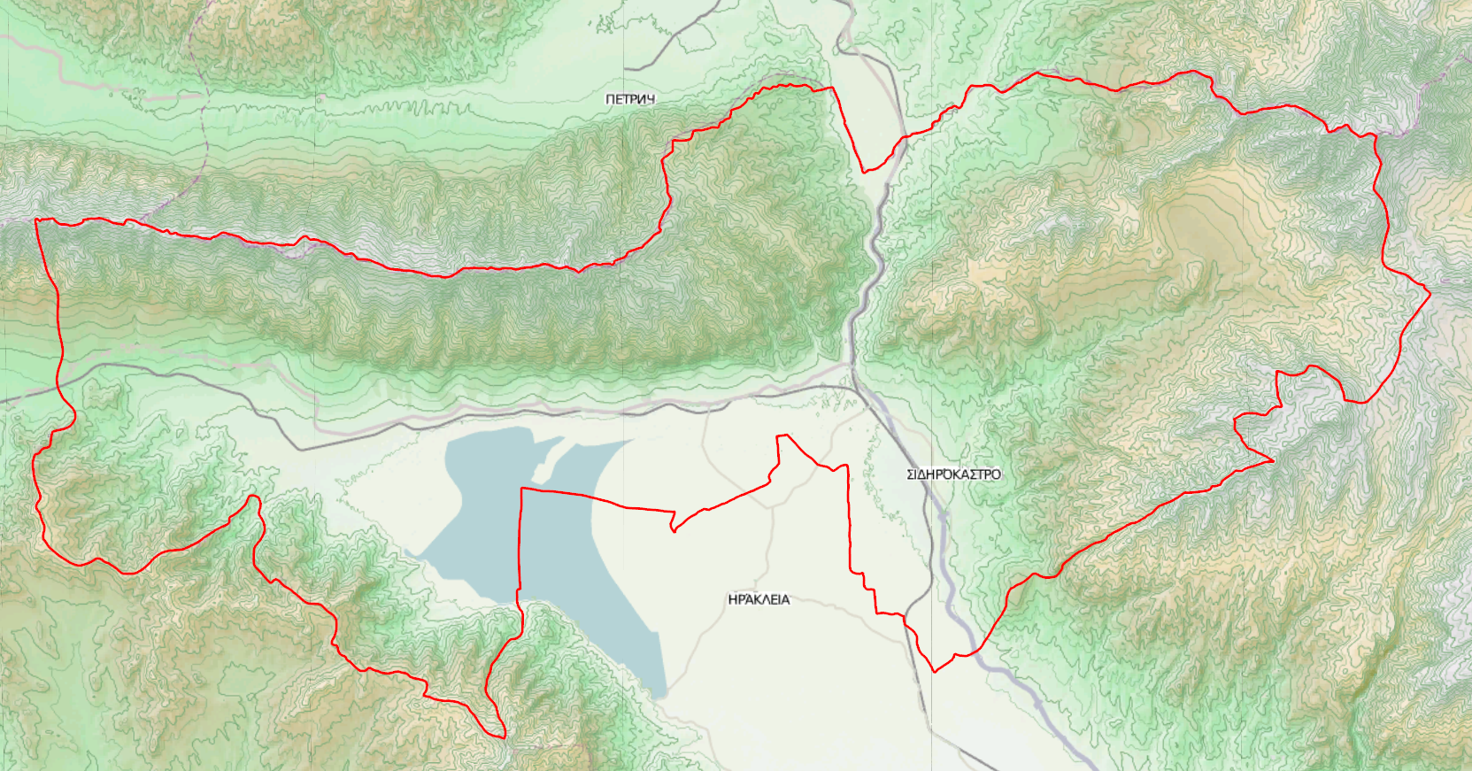 Τοπογραφικός χάρτης του Δήμου Σιντικής